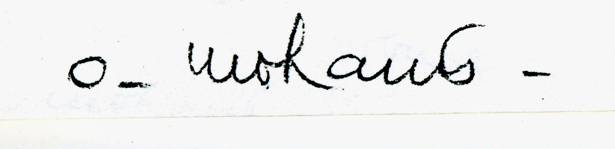 Signature du peintre algérien Abderrahmane_Ould Mohand